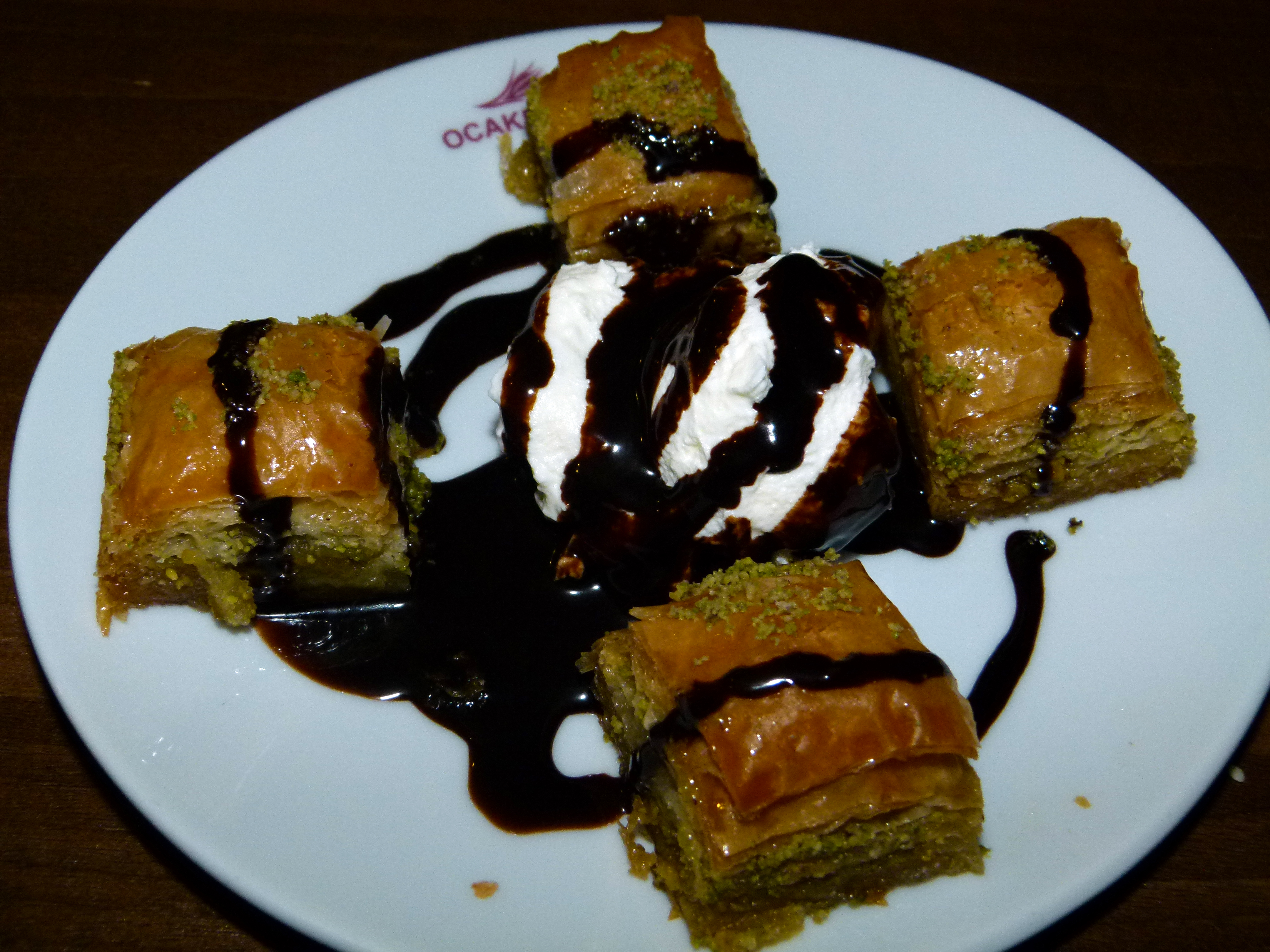 Baklava - Teigfaden in Blätterteigmantel, gefüllt mit Wallnuss, Türkisches Restaurant OCAKBASI, Dresden